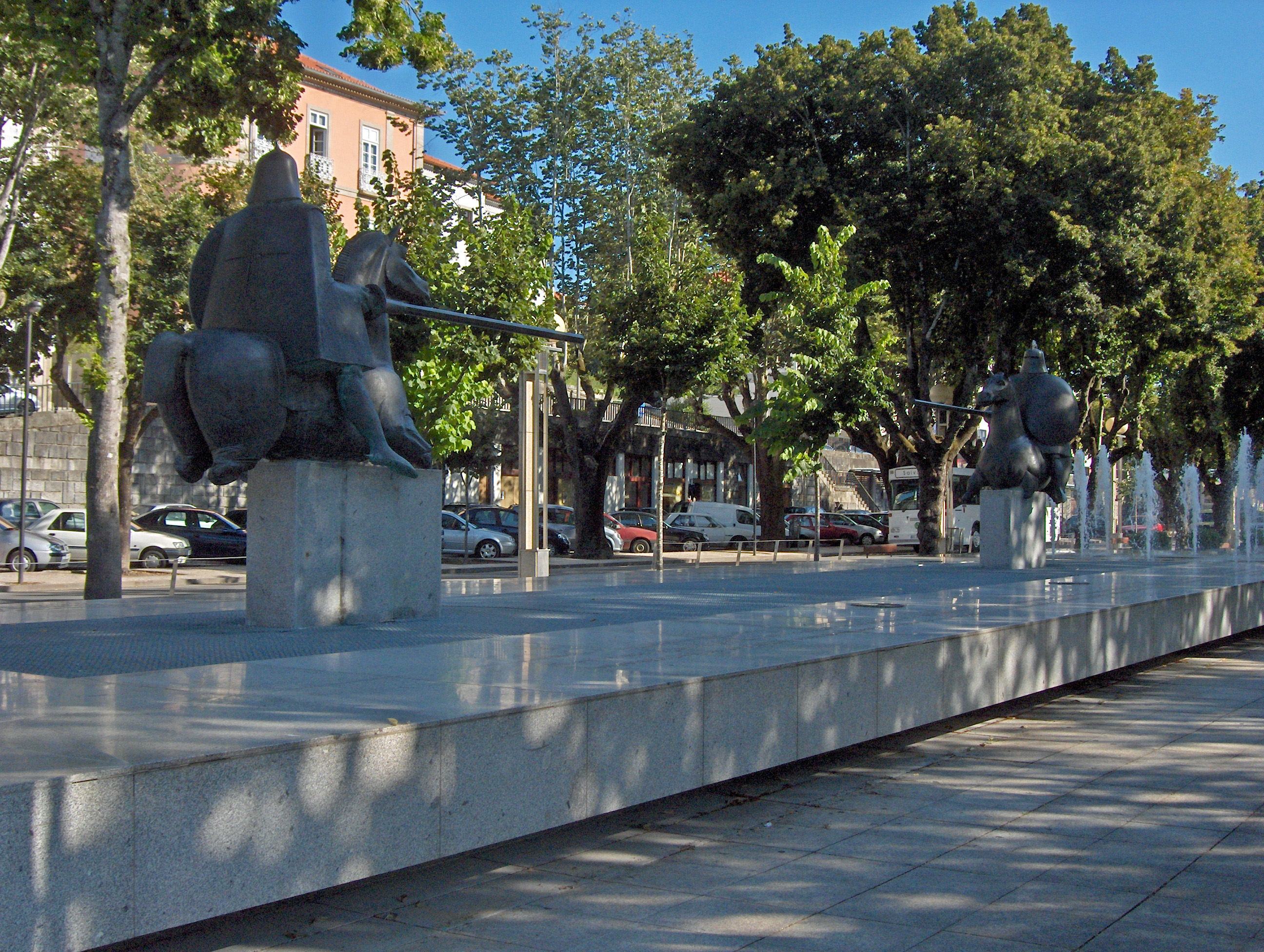 Fonte luminosa no centro de Arcos de Valdevez, Portugal.